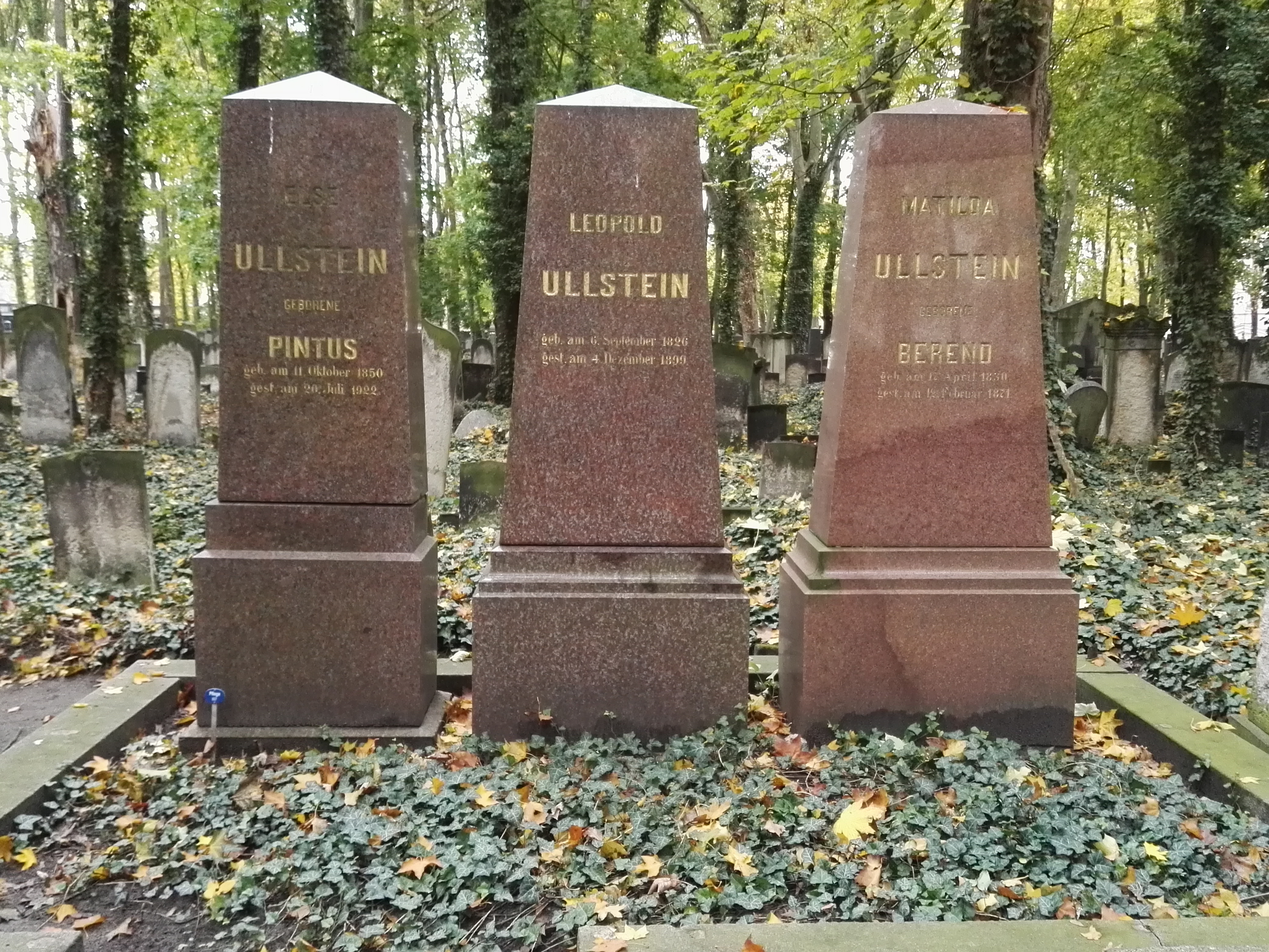 Grab von Leopold Ullstein auf dem Jüdischer Friedhof Schönhauser Allee in Berlin-Prenzlauer Berg